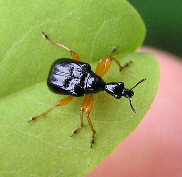 Apoderus erythrogaster auf einem Robinienblatt an einem Straßenrand in Shiga (Japan).